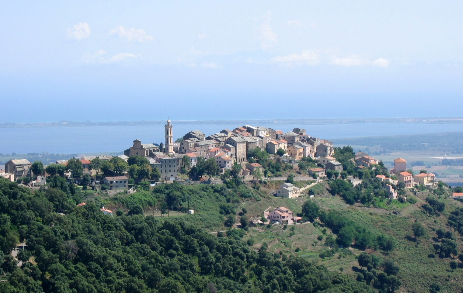 Le village de Borgo dominant la plaine et une partie de l'étang de Biguglia, avec vue sur le cordon lagunaire de la Marana.